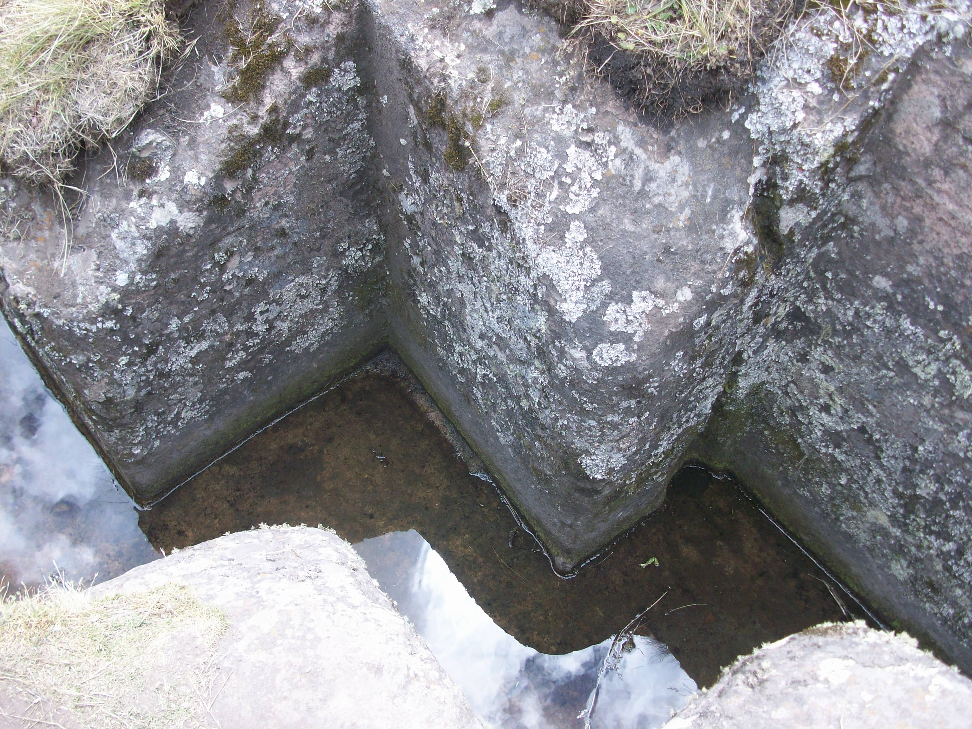 Arquitectura preinca en las faldas del cerro en el bosque de piedras de Cumbemayo en Cajamarca, Perú.